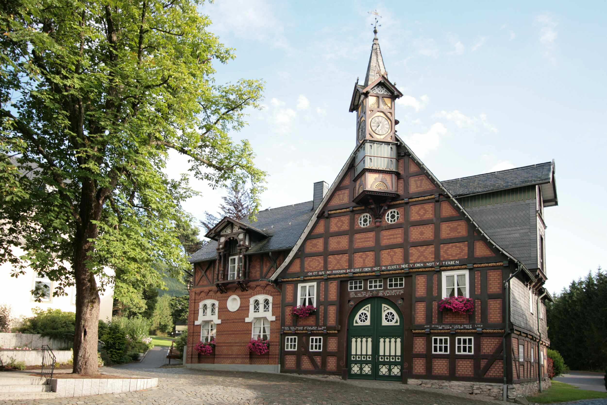 Beschreibung: Kroppsche Haus in Olsberg Quelle: Eigenes Foto Urheber: Wolfgang Poguntke Aufnahmedatum : 12.07.2008